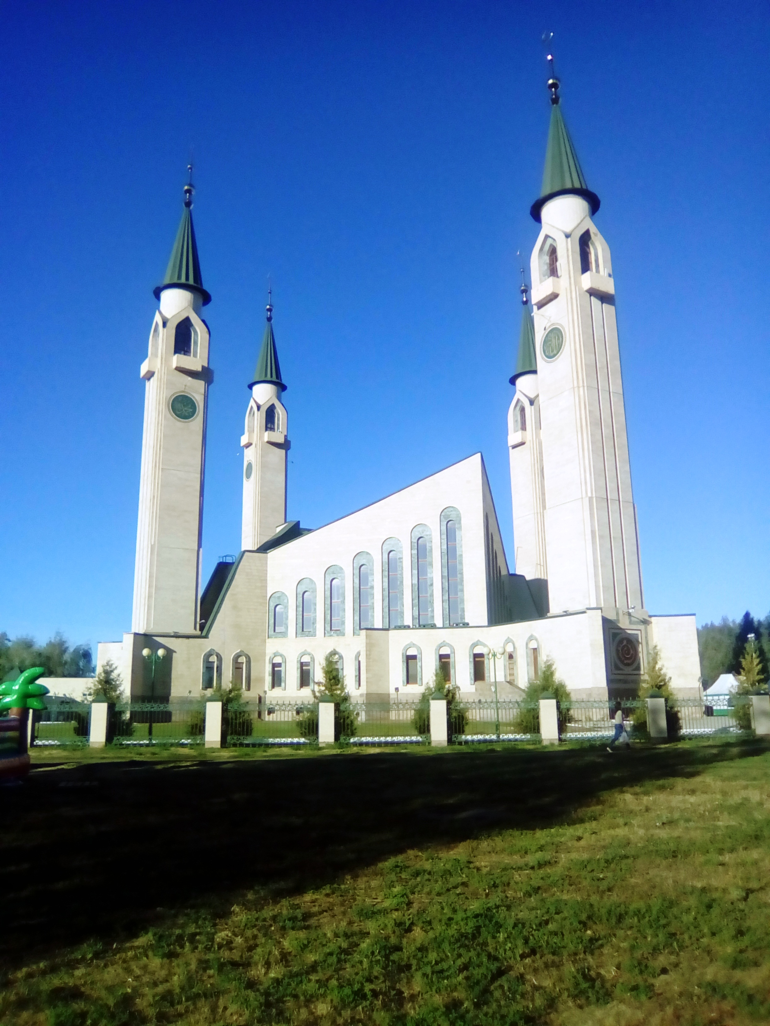 Соборная мечеть: Нижнекамск, Татарстан